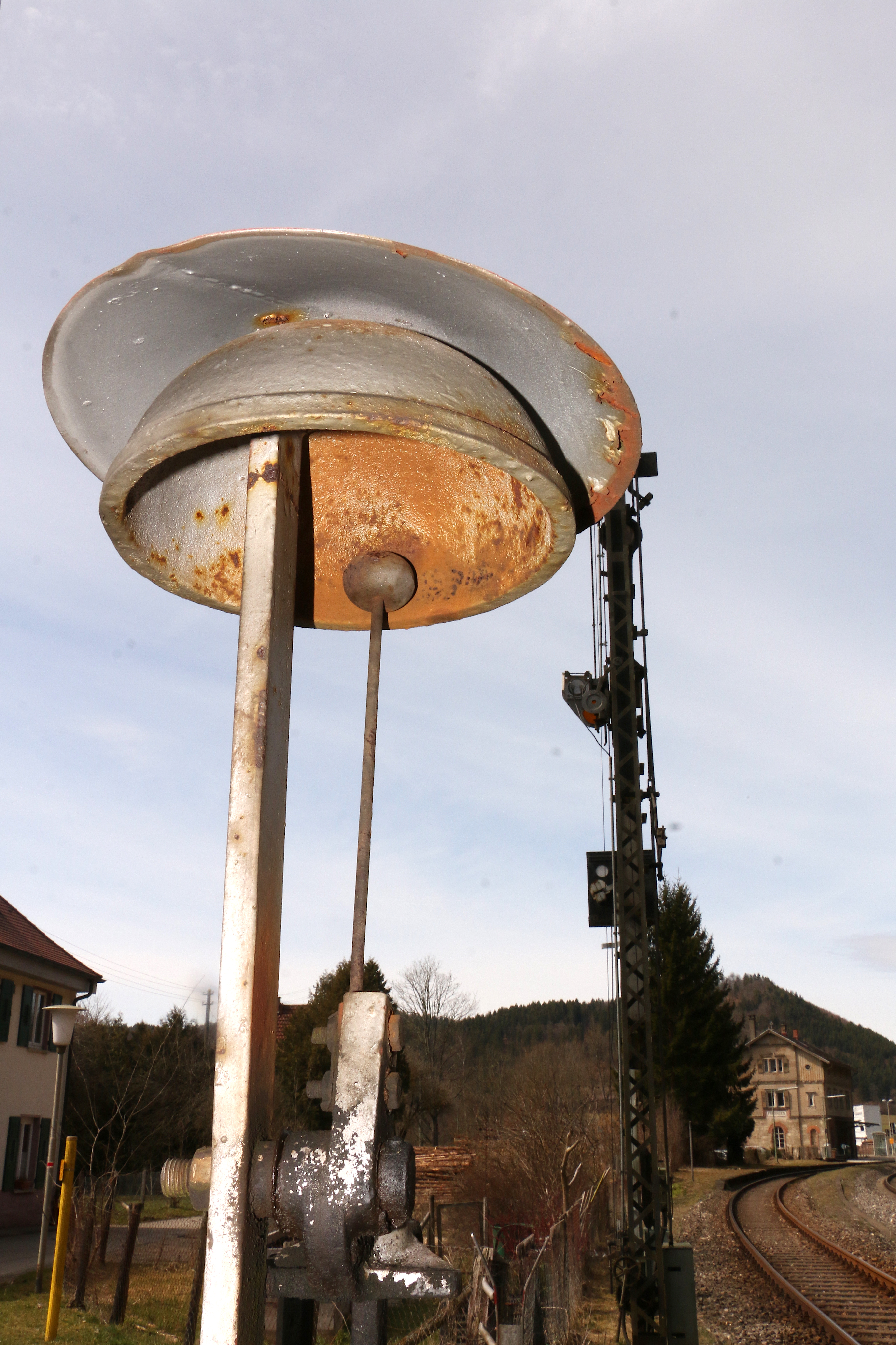 Bahnschrankenglocke Fridingen